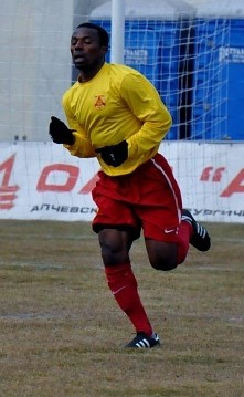 Франк Оливье Онгфианг — камерунский футболист.